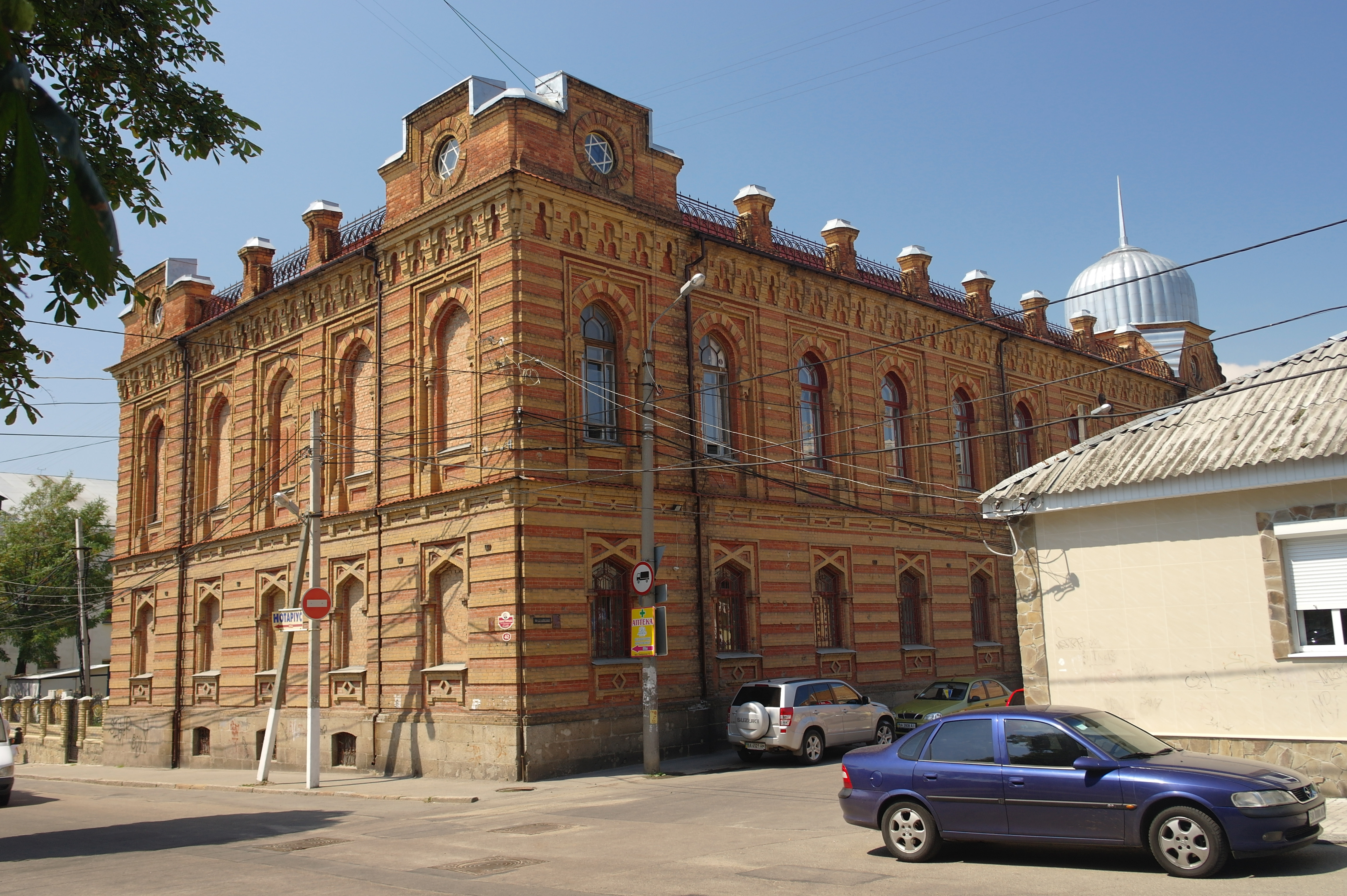 Кіровоград, велика синагога